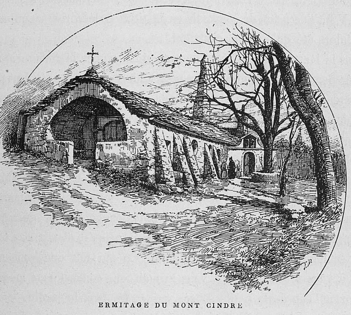 Aux environs de Lyon / Monsieur Josse ; préface de M. Coste-Labaume ; édition illustrée de 250 dessins de J. Drevet.